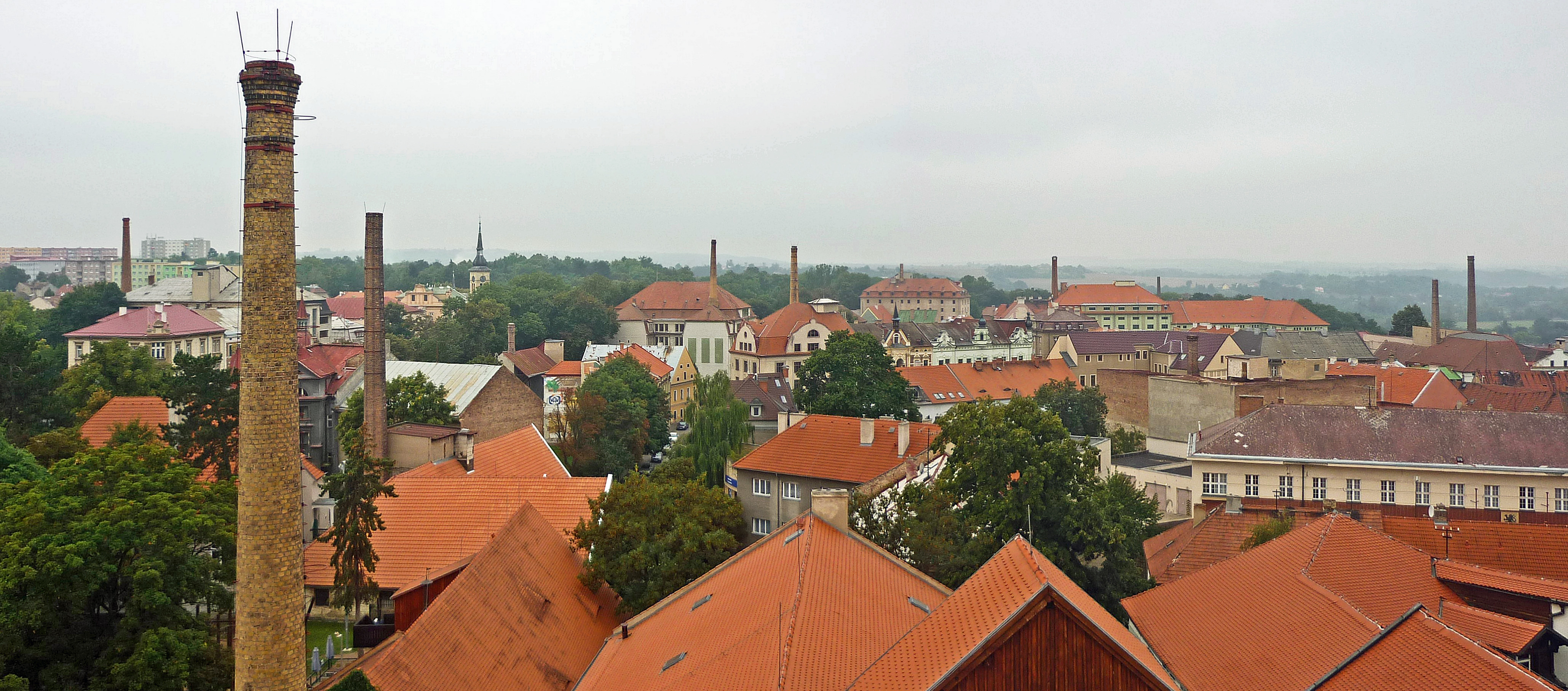 Saaz/Žatec, Prager Vorstadt, Blick vom Hopfenturm auf die ehem. Hopfenhandelsfirmen